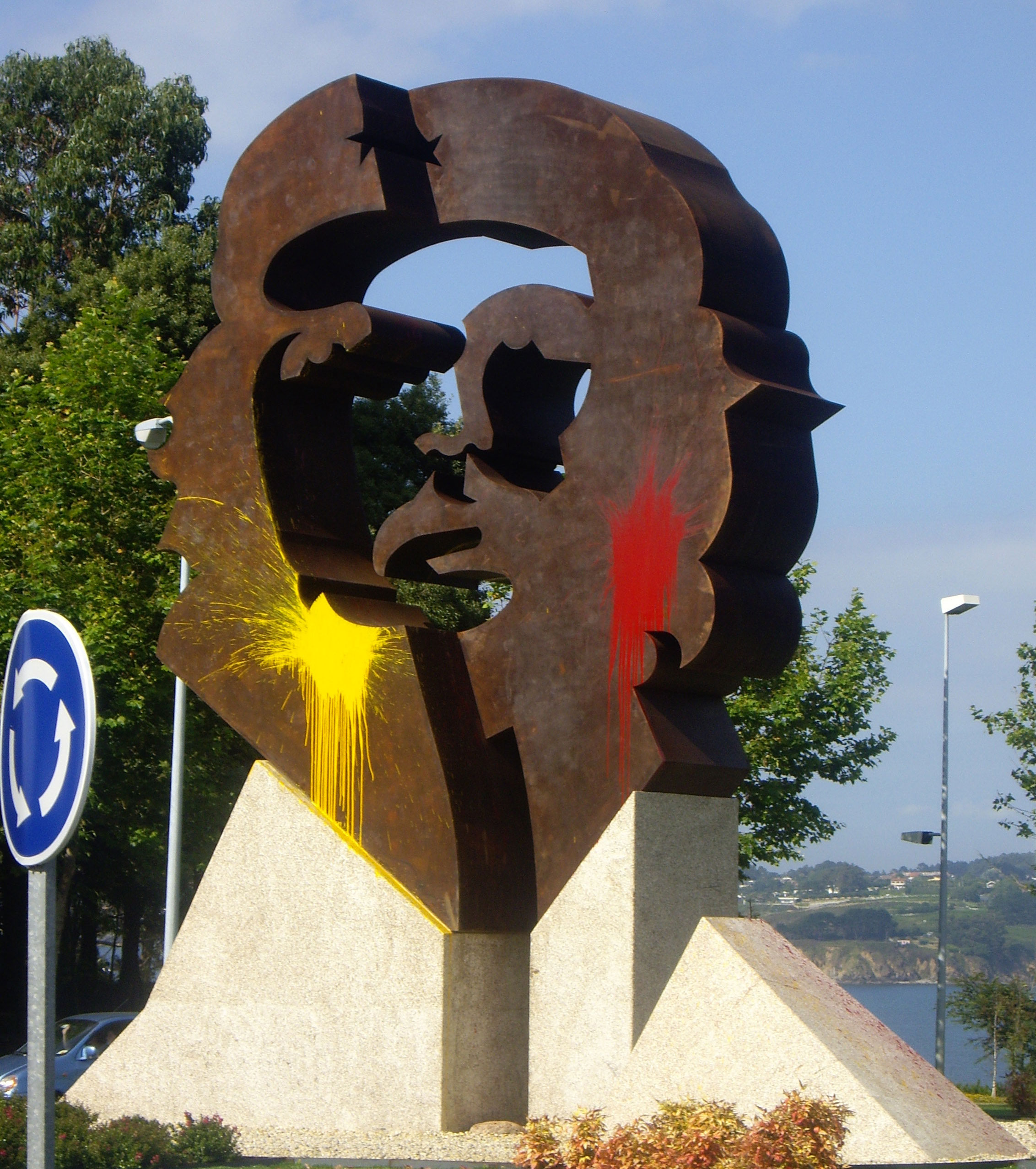 Estatua do Che Guevara o 9 de xullo de 2008